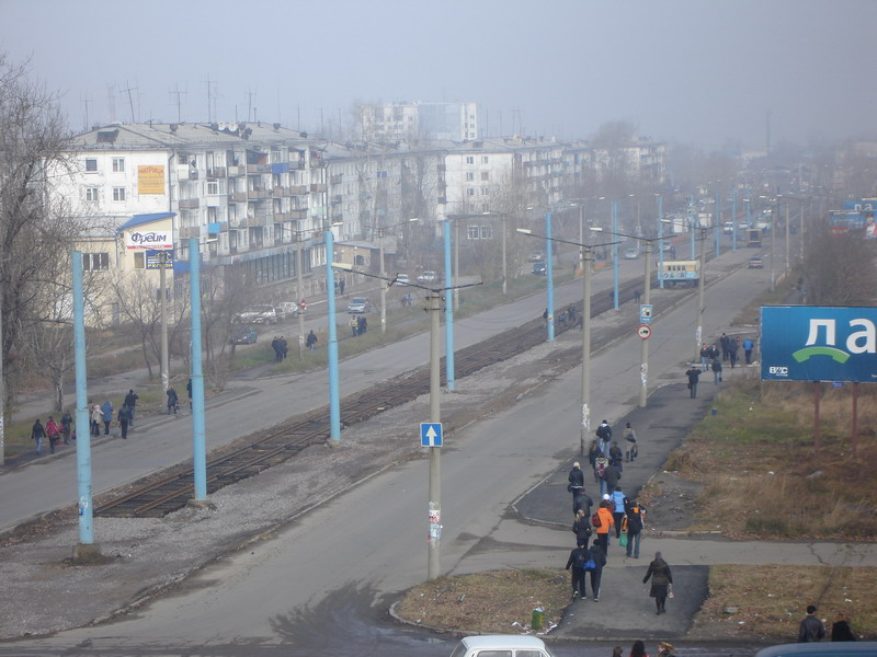 Строительство трамвайных путей Привокзальный-Вокзал